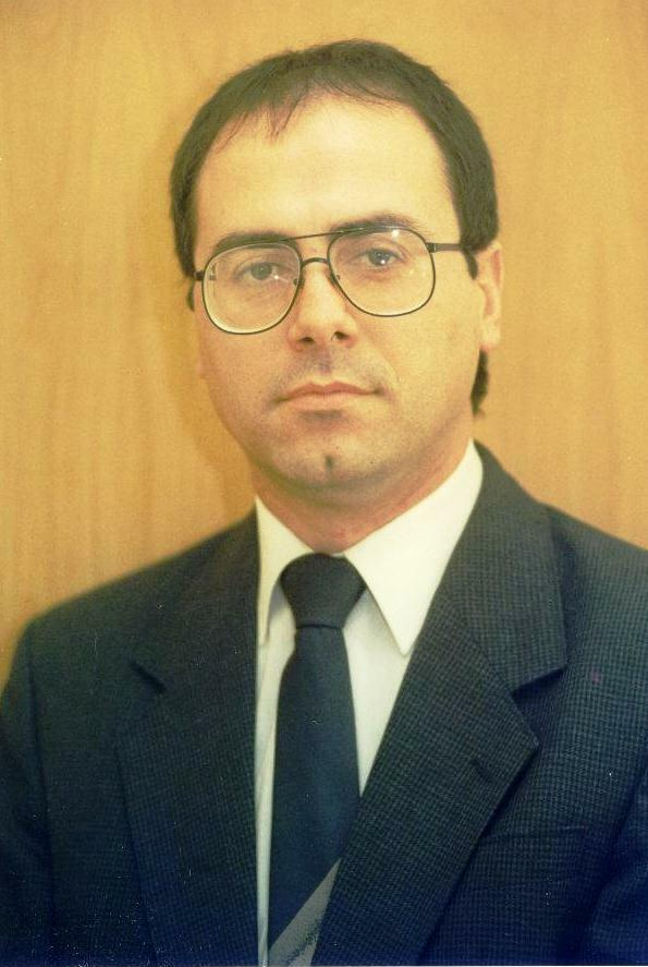 סילבן שלום בעת שכיהן כיו"ר דירקטוריון חברת החשמל 1990 - 1992